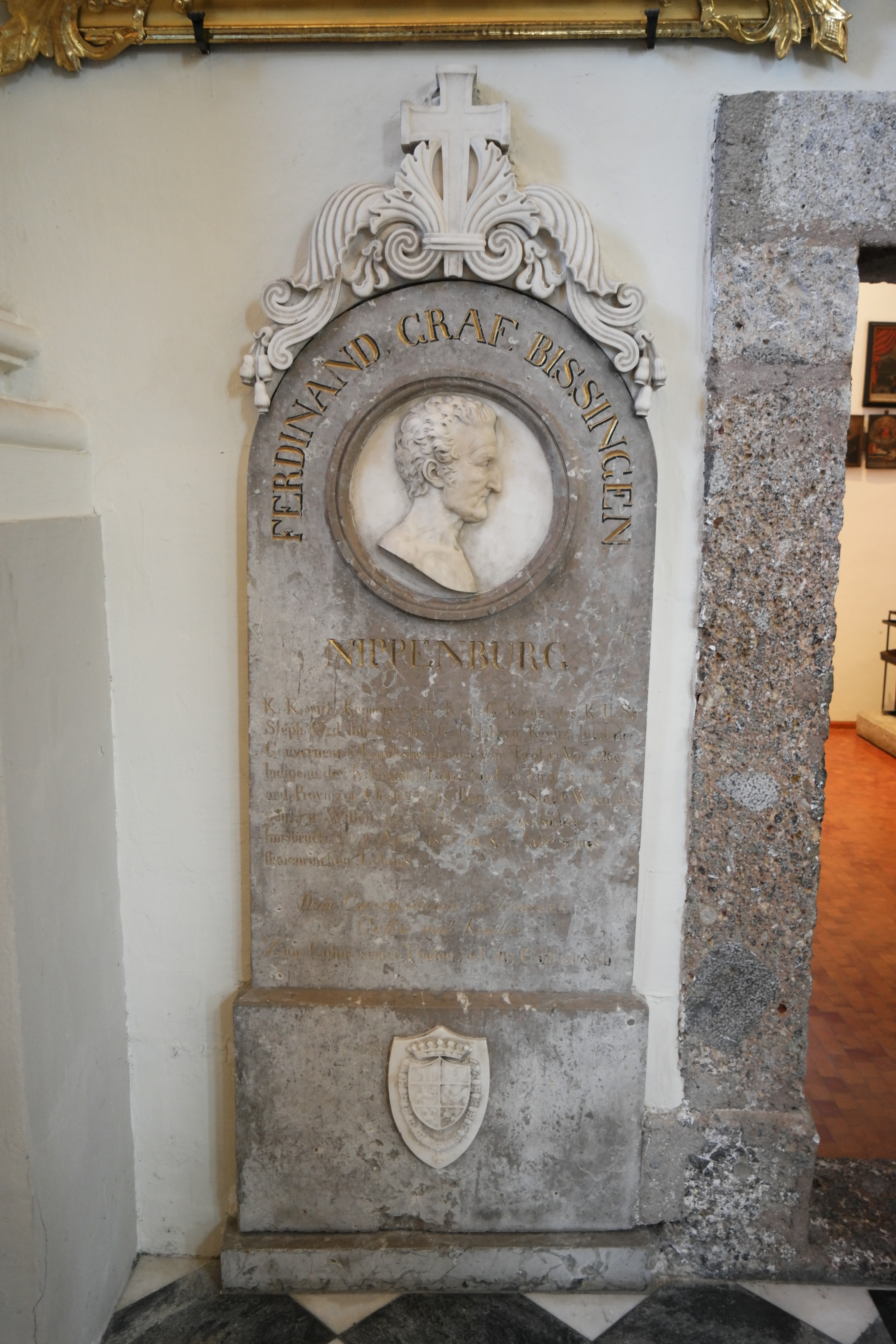 Grab des österreichischen Beamten und Politikers Ferdinand von Bissingen-Nippenburg (1749-1831) in der Basilika Innsbruck-Wilten